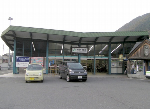 2005年11月23日に投稿者が撮影 相模湖駅